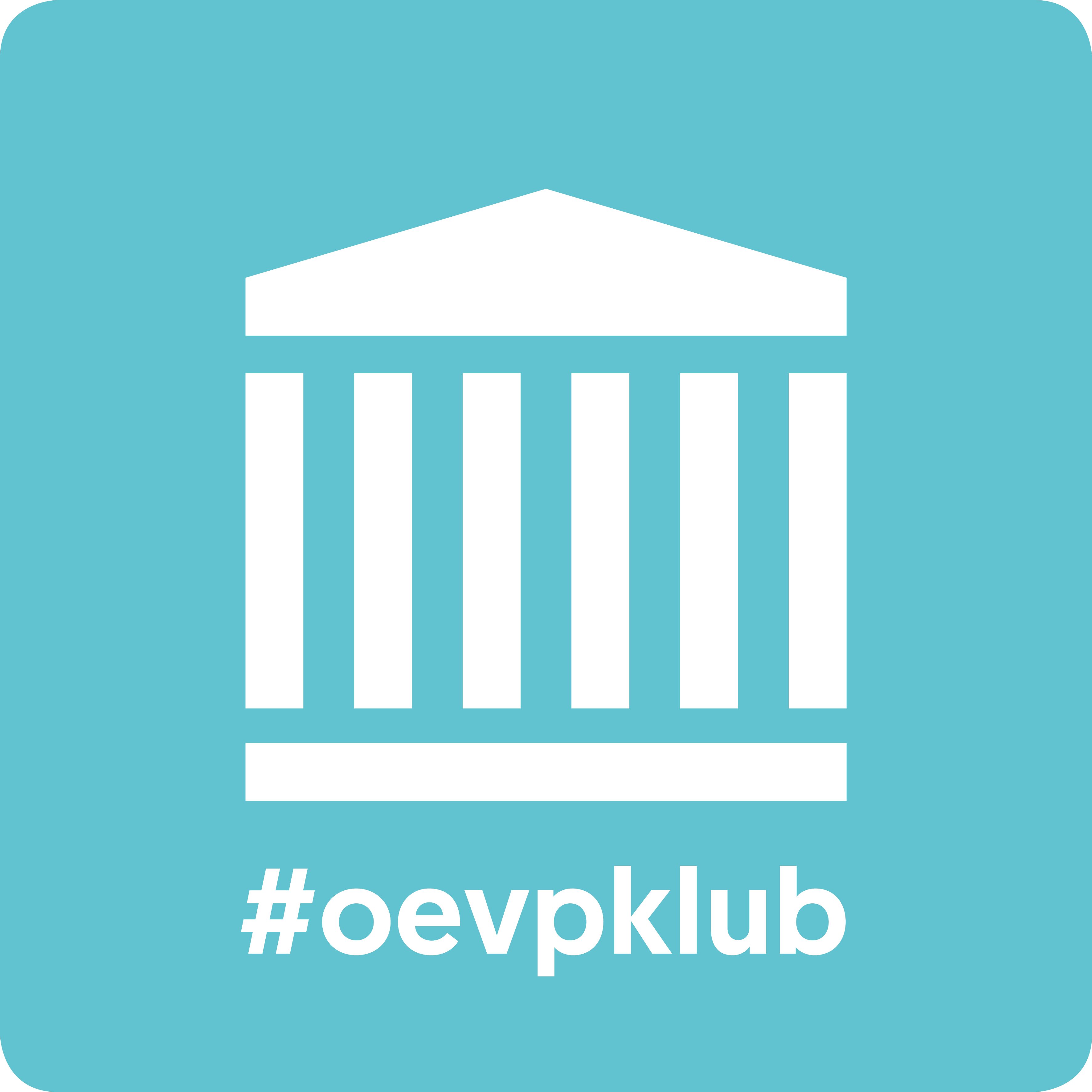 Logo des Parlamentsklubs der Österreichischen Volkspartei seit Nov. 2017